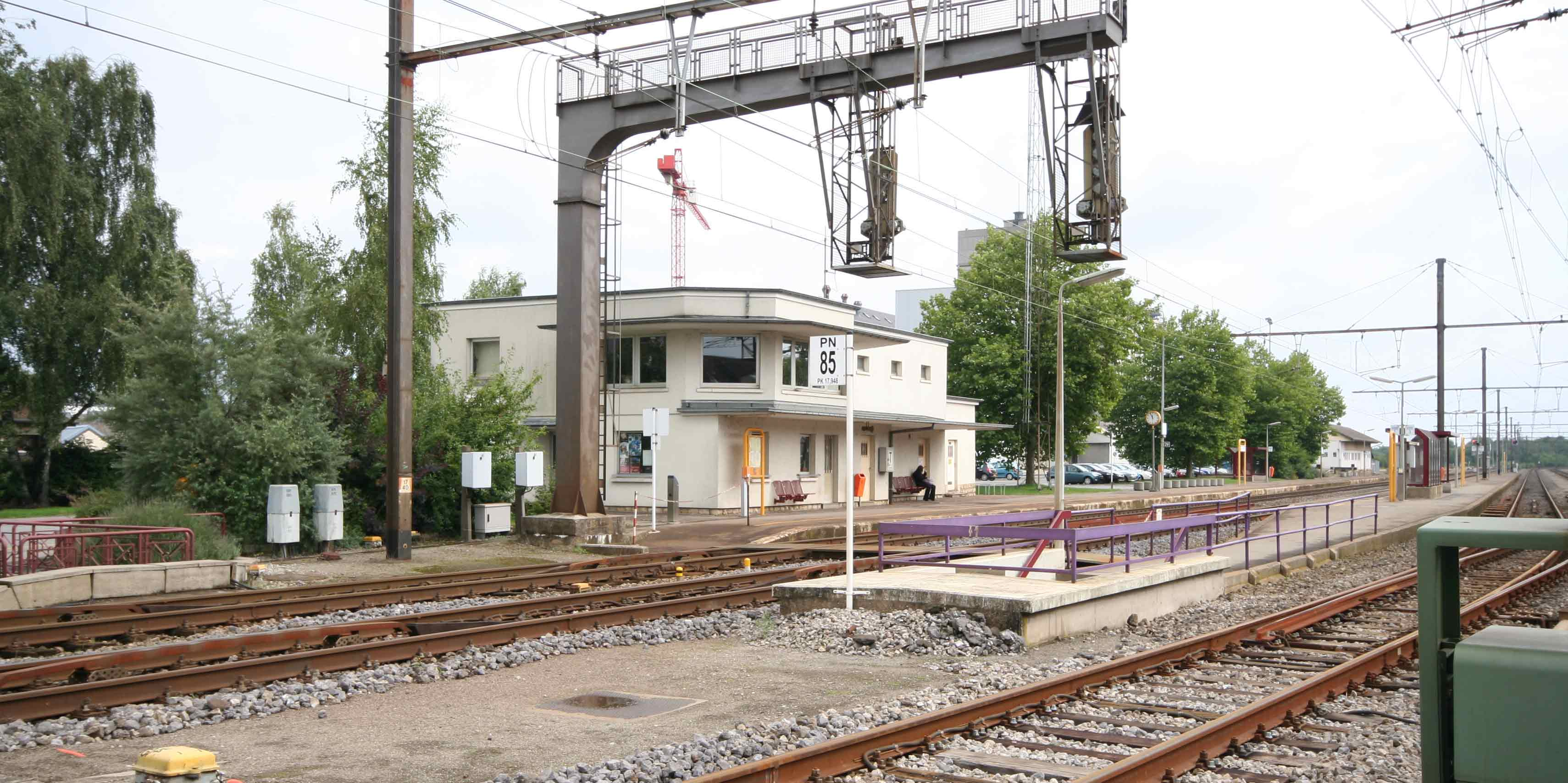 Sujet:Gare KLB Source:Fotograf:User:Cornischong Lizenz